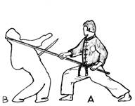 Auteur : Alain DELMAS - Dictionnaire encyclopédique du Thaing (Bando) 1999 - Copyright France 2006